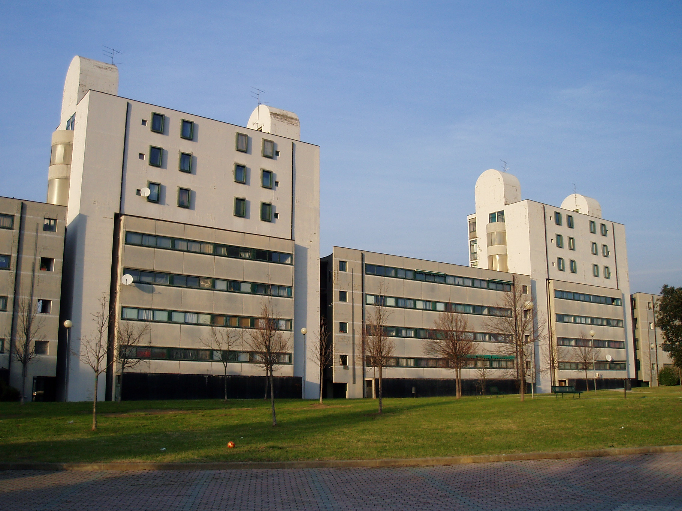 Paolo Cerretini 2005